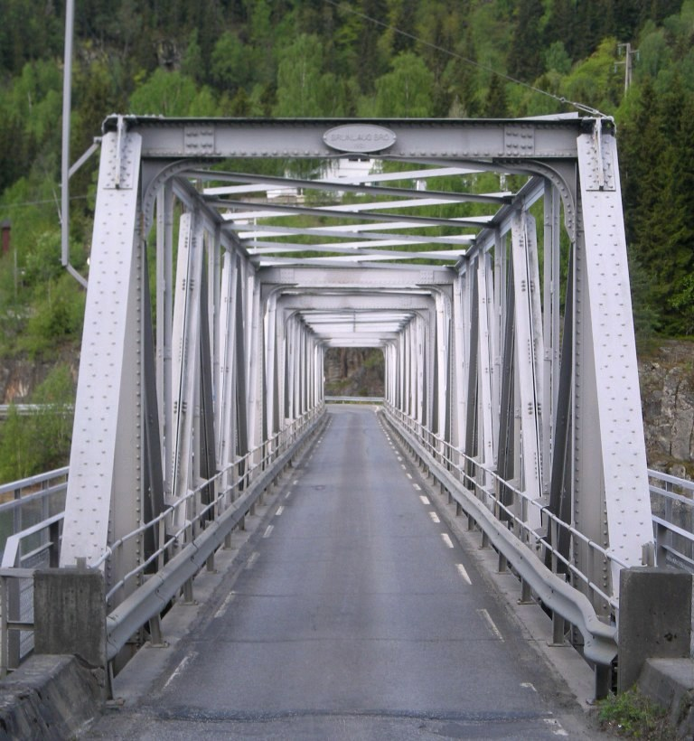 Brunlaug bro ved Fåberg